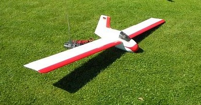 KN_Marske XM1D_Vampyr_RC-Model